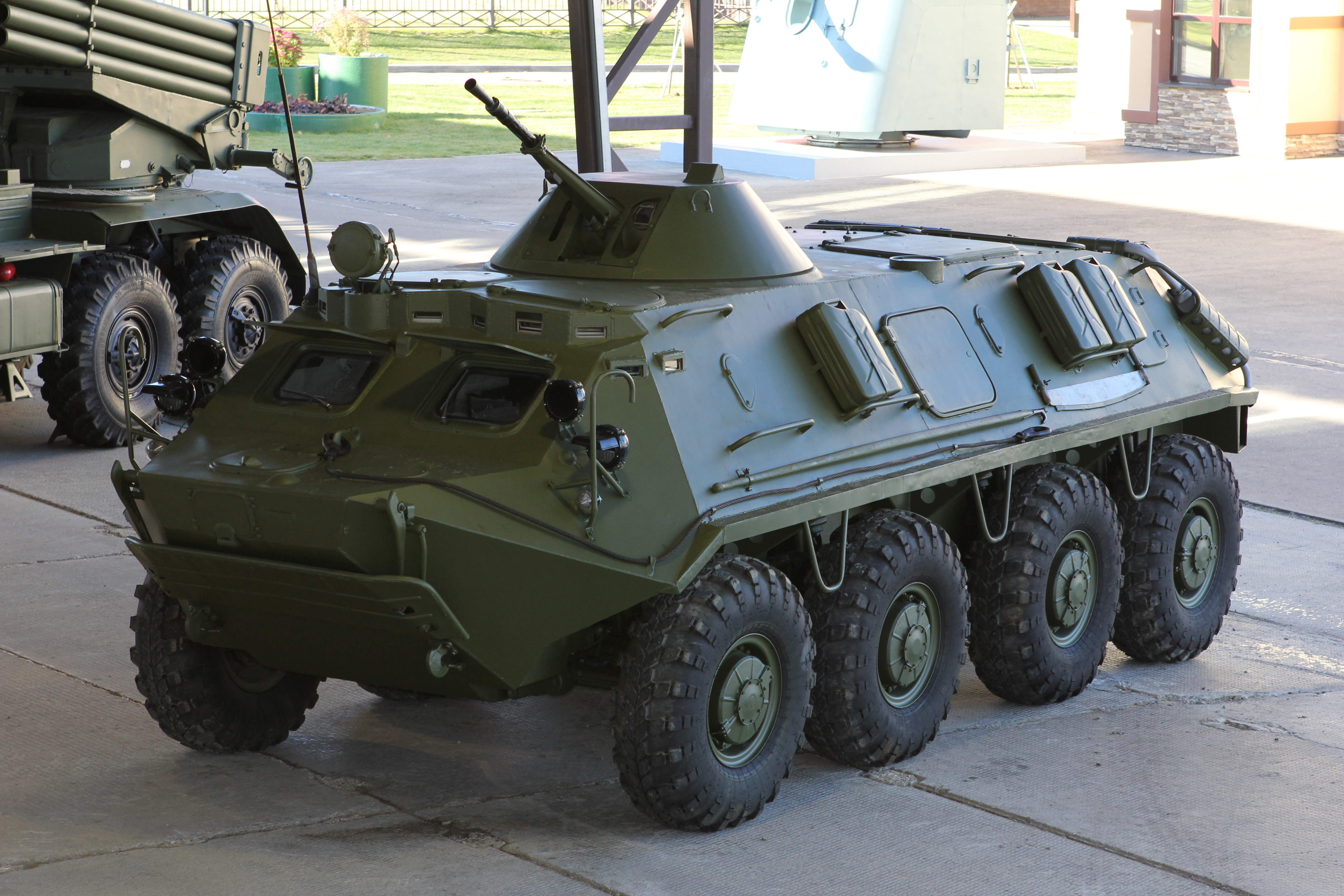 Бронтранспортер БТР-60 в Музее отечественной военной истории